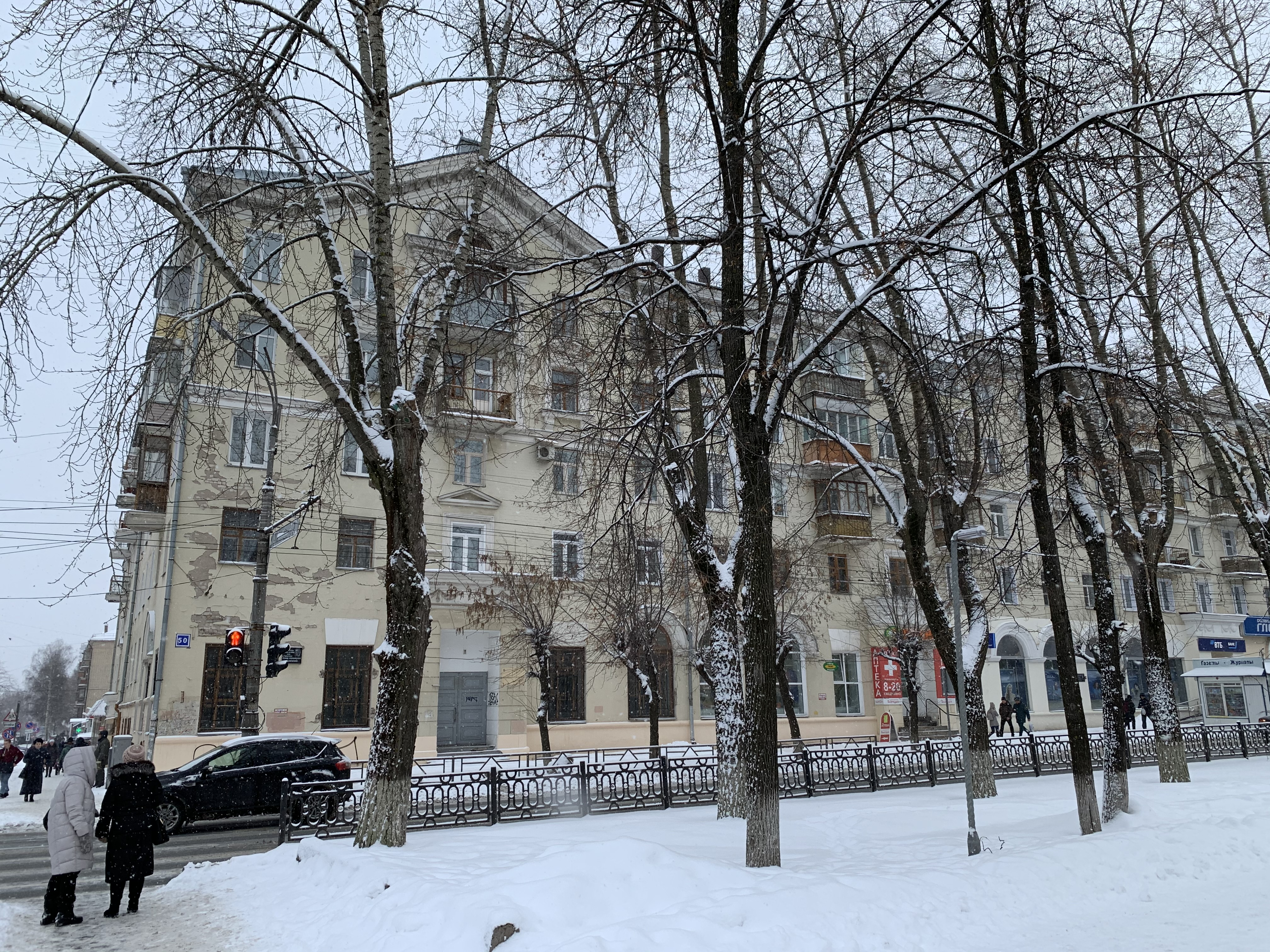 Город Киров. Дом №50 по Октябрьскому проспекту, где жил писатель Леонид Дьяконов